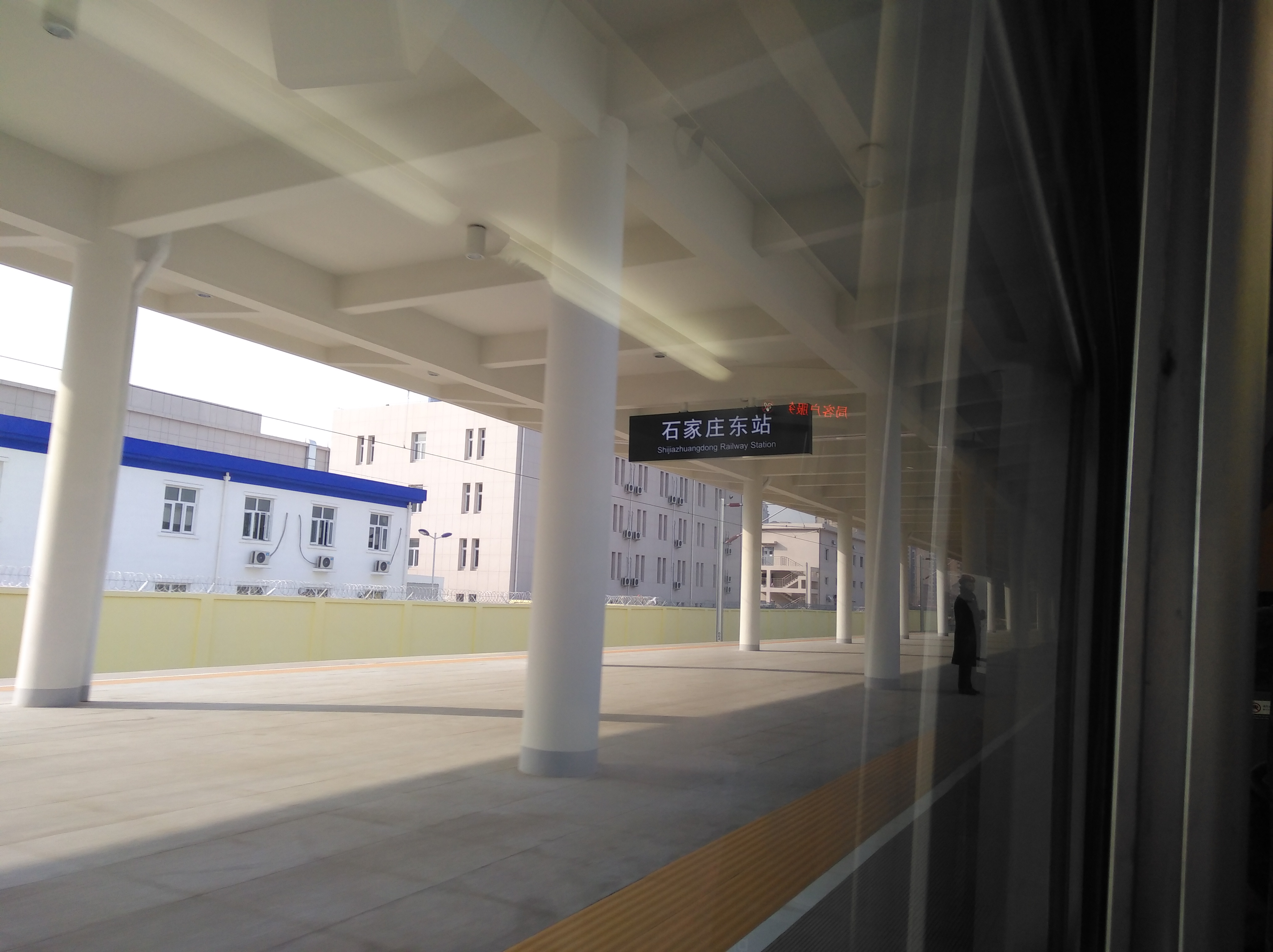 中文（中国大陆）: 石家庄东站站台（2018年1月）